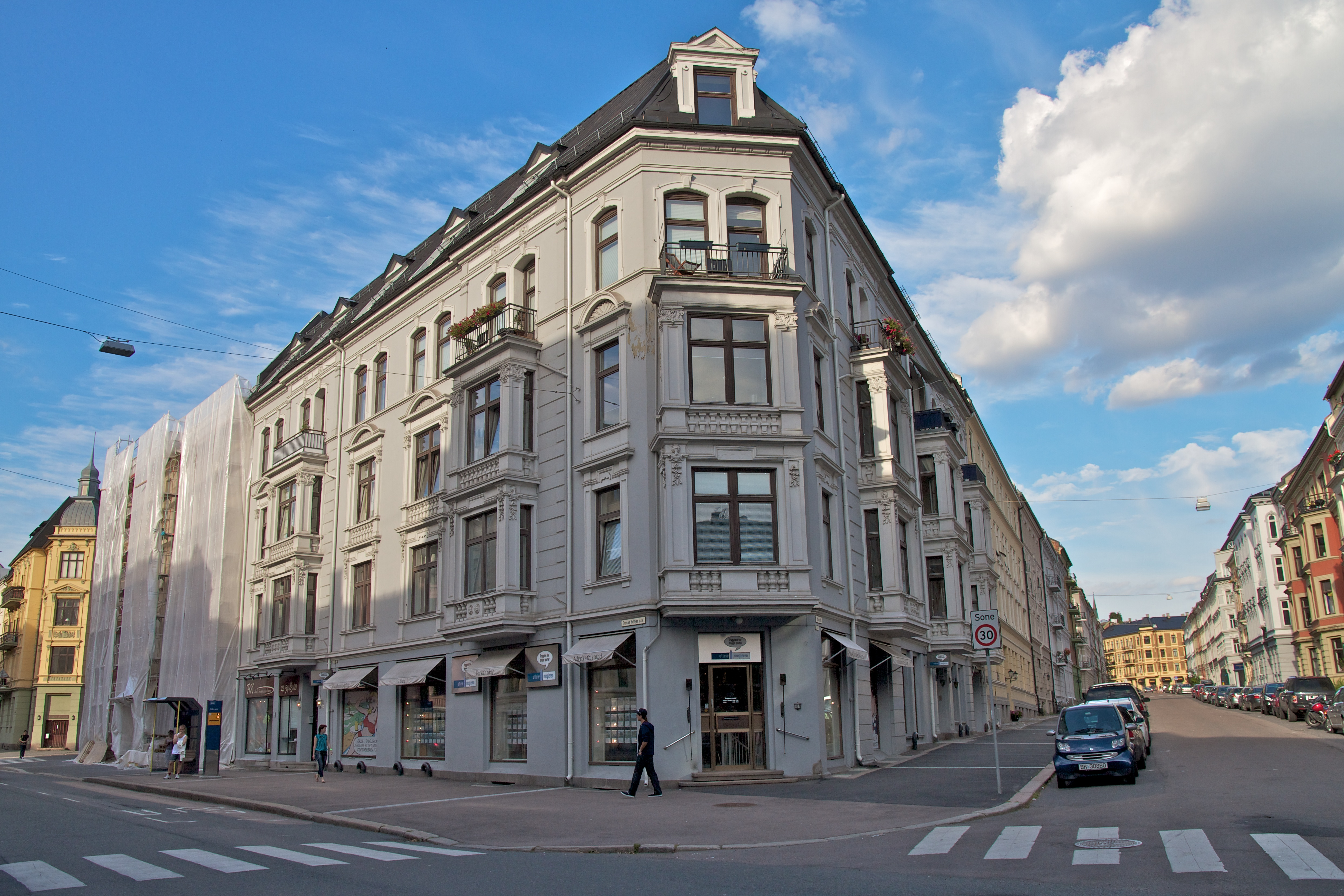 Thomas Heftyes gate 39, Frogner i Oslo.